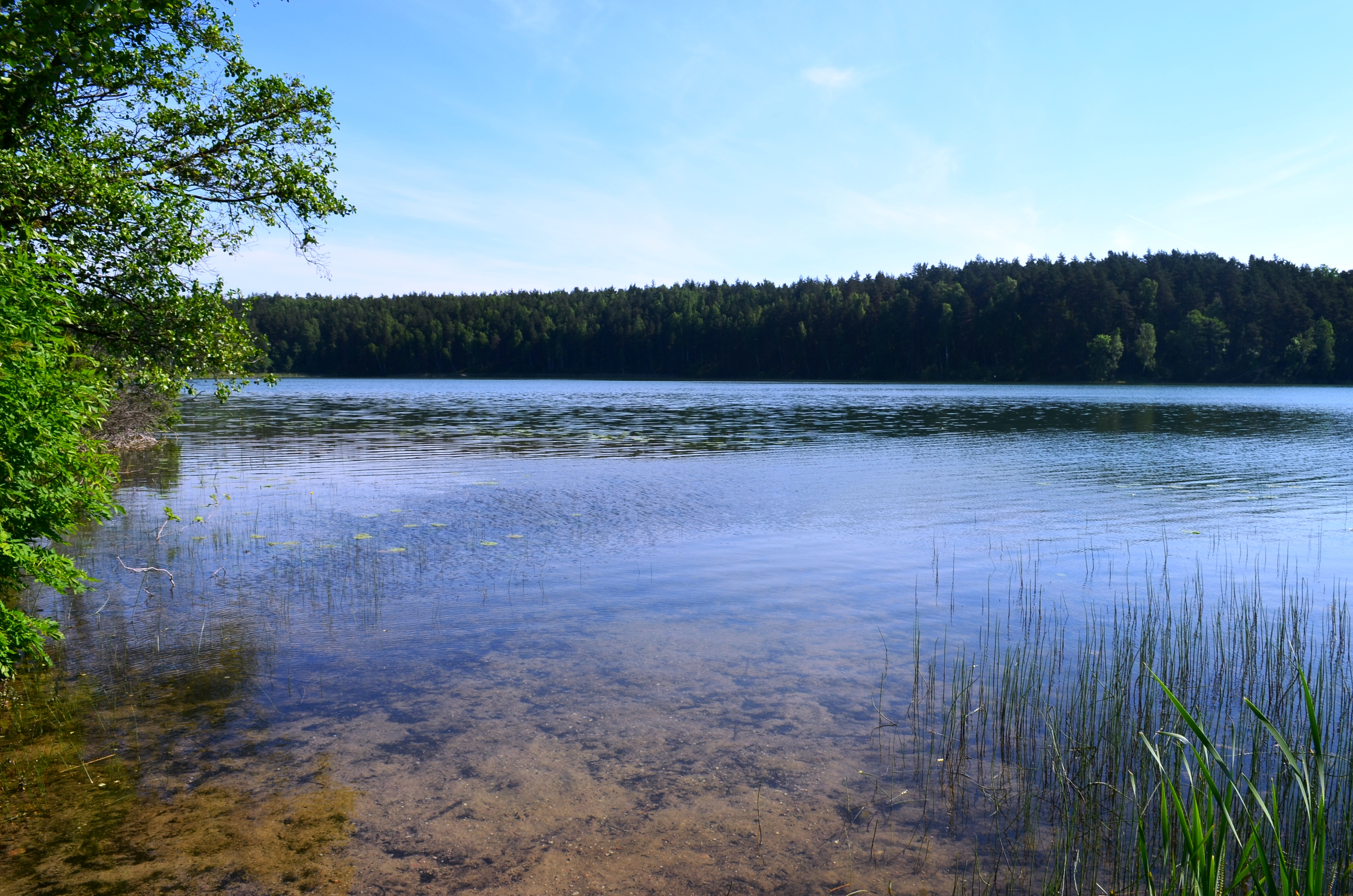 Asveja ties Jonėnais, Vilniaus r.